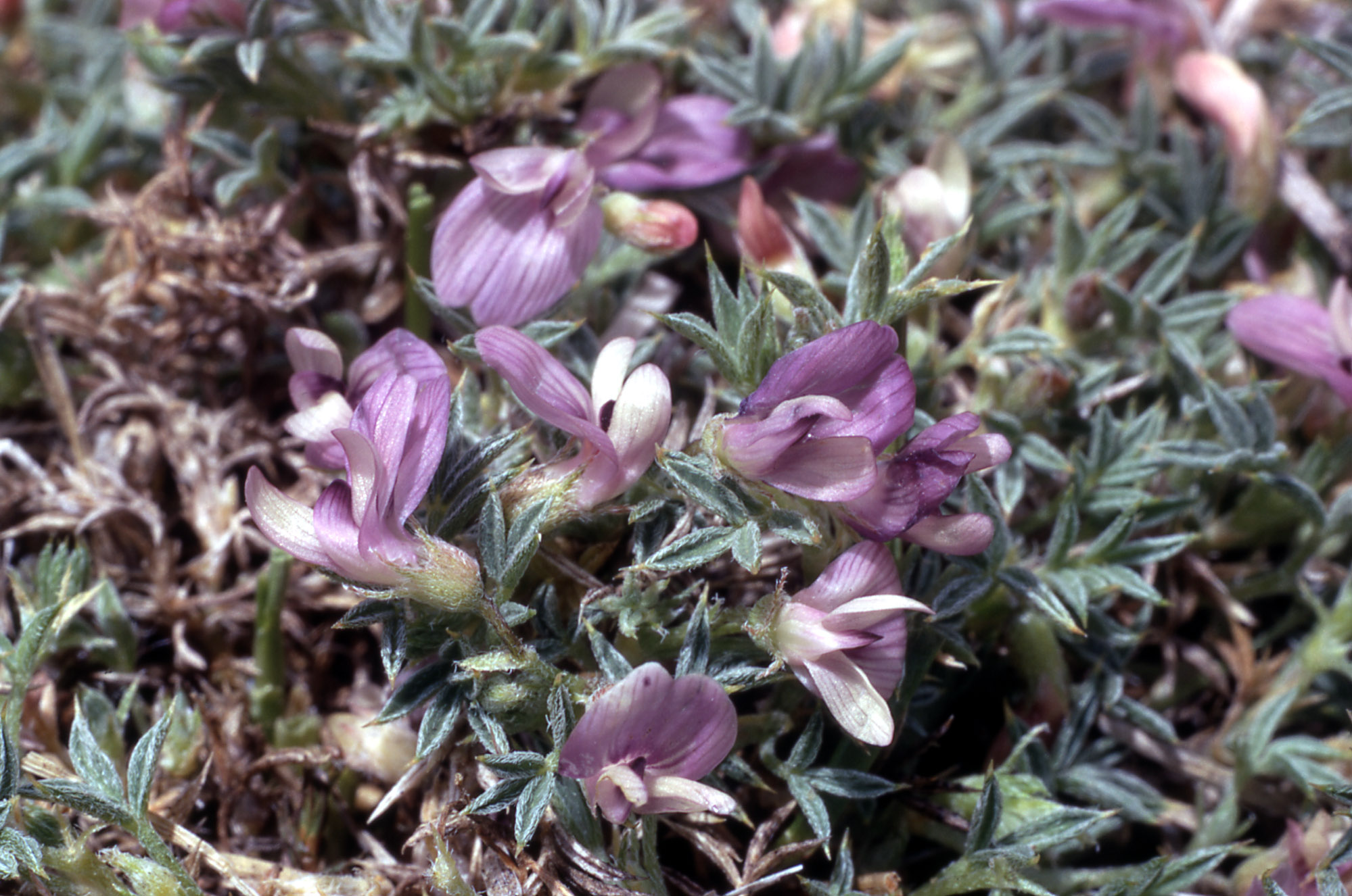 Astragalus kentrophyta var. tegetarius